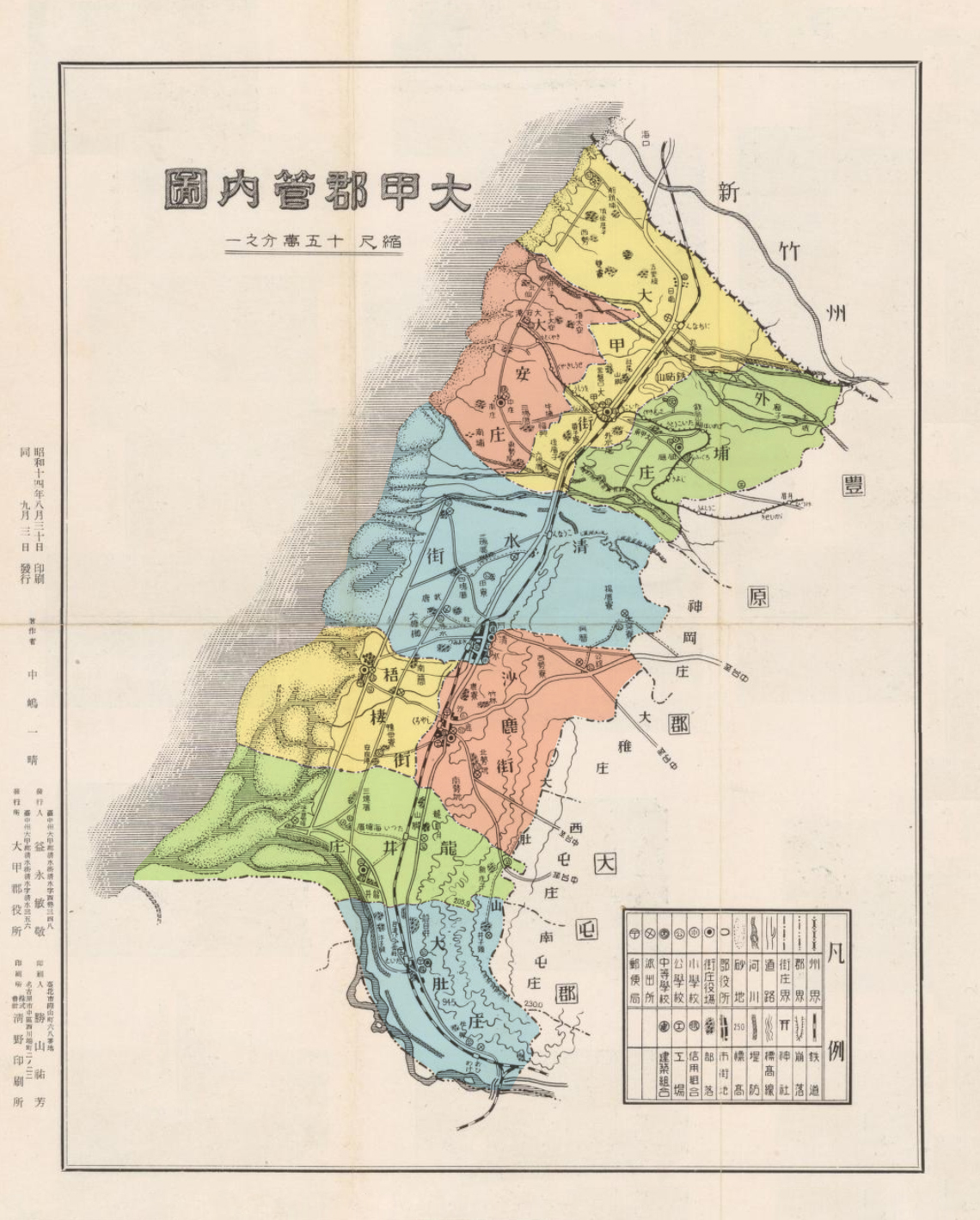 中文（台灣）: 大甲郡包含大甲街、清水街、梧棲街、沙鹿街、外埔庄、大安庄、龍井庄、大肚庄。